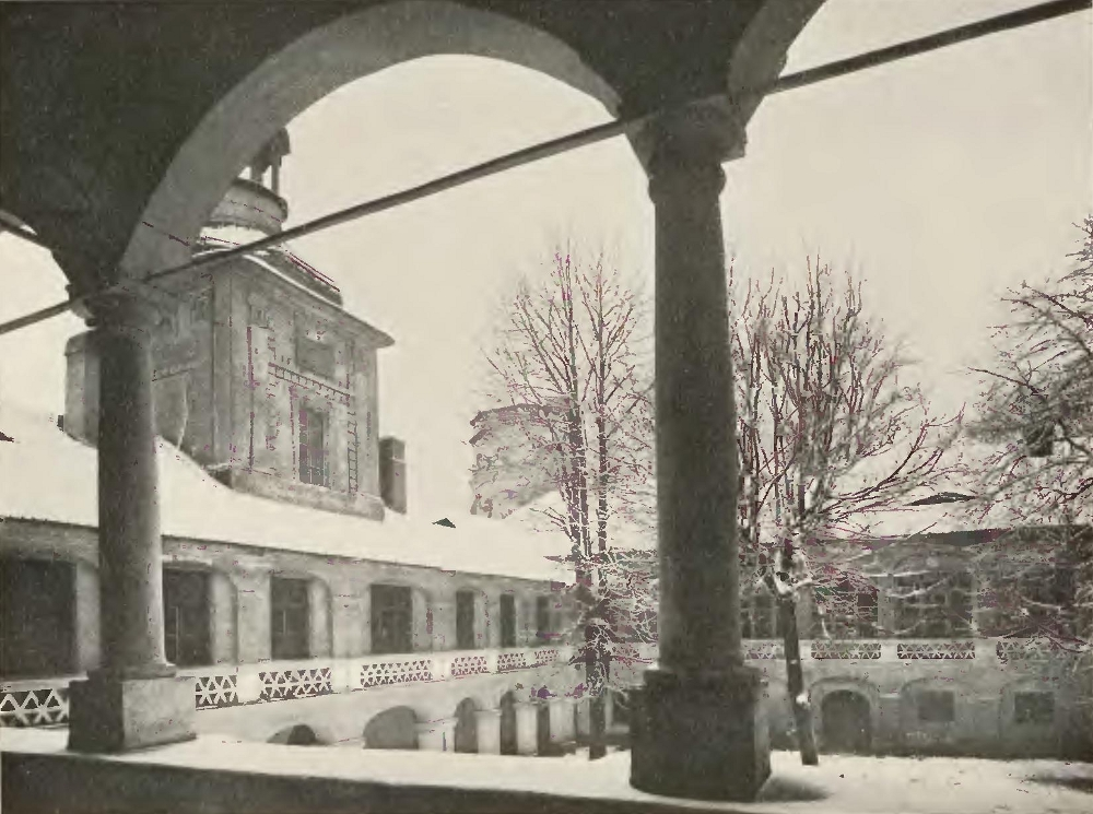 Schloss Zyrowa in Oberschlesien